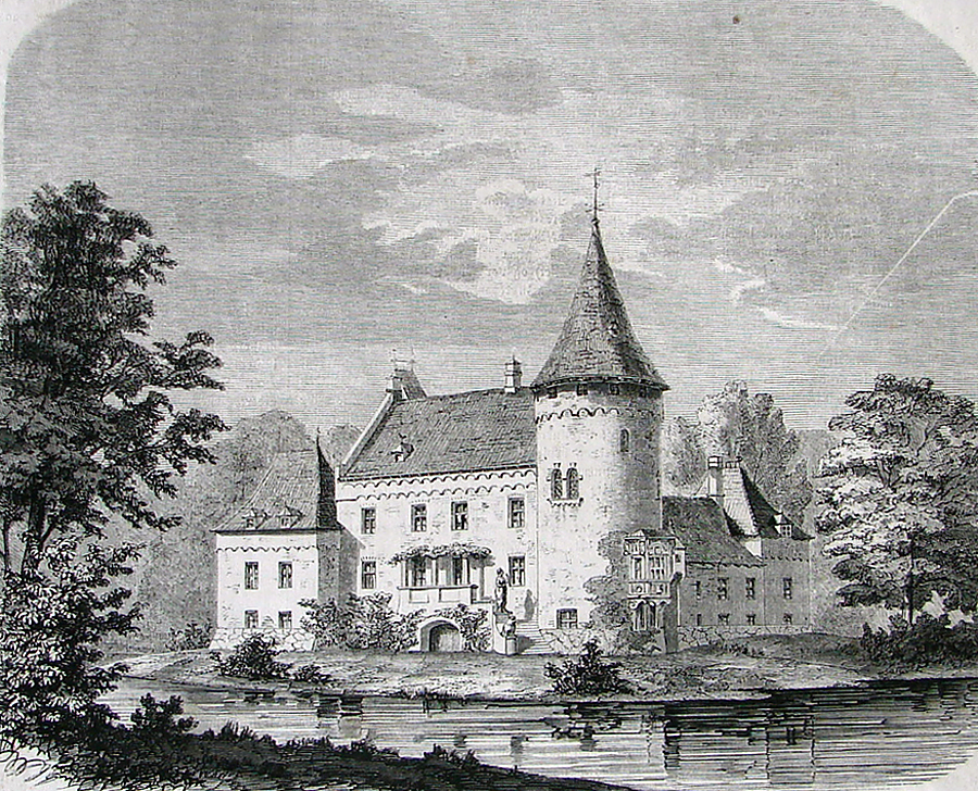 Ørtofte Slot i Skåne